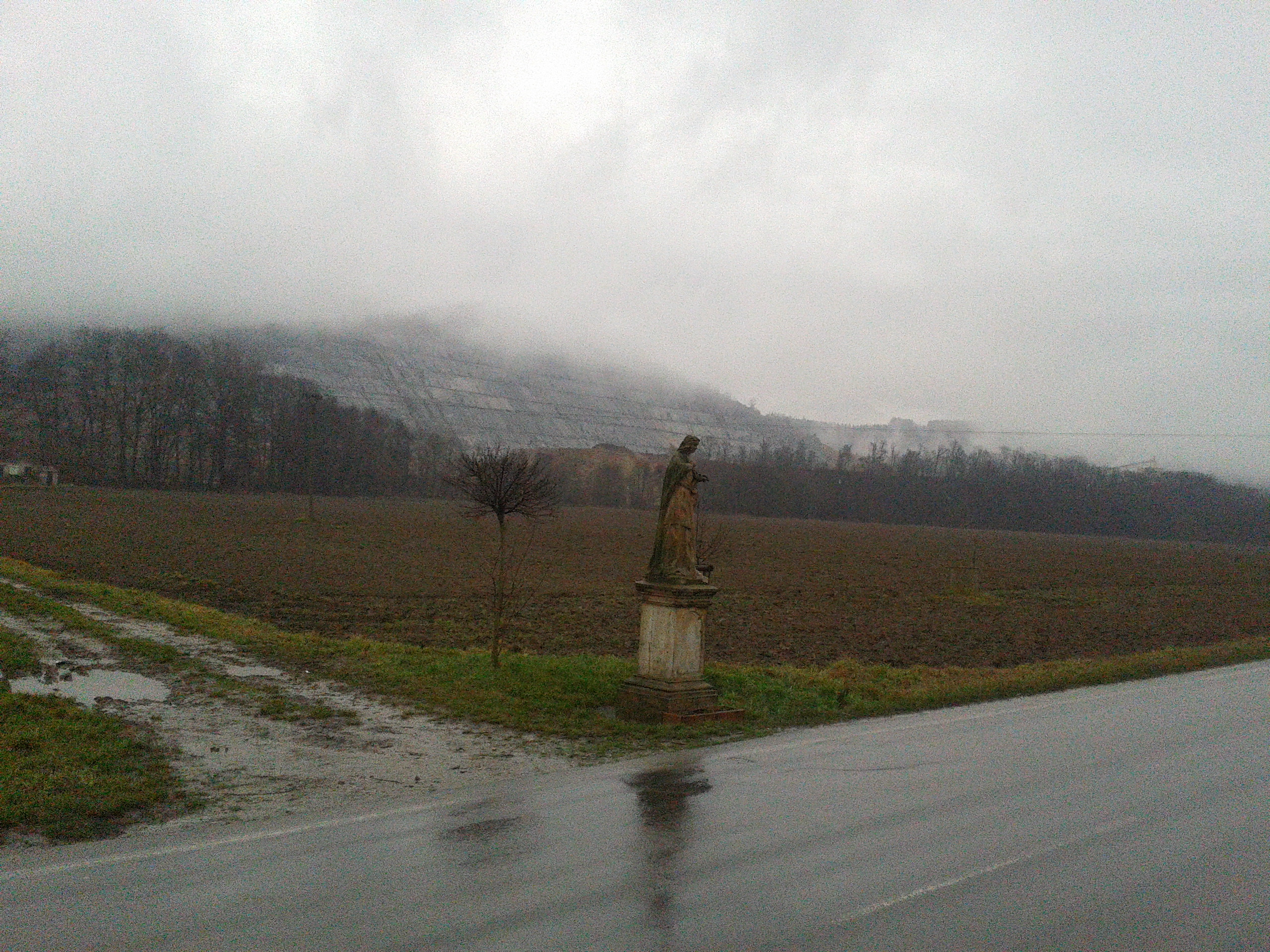 Leština lom